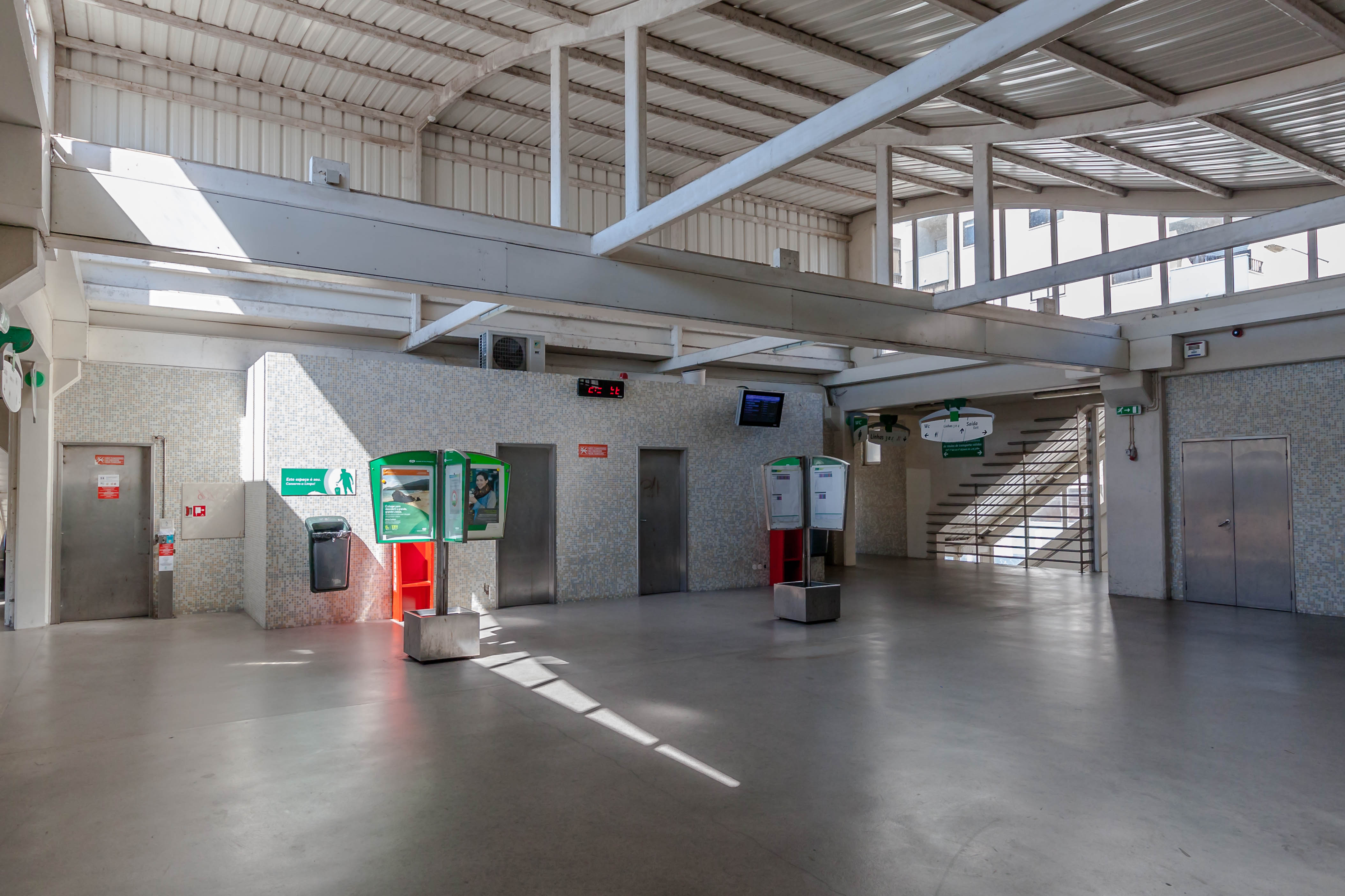 Estação Ferroviária de Queluz-Belas